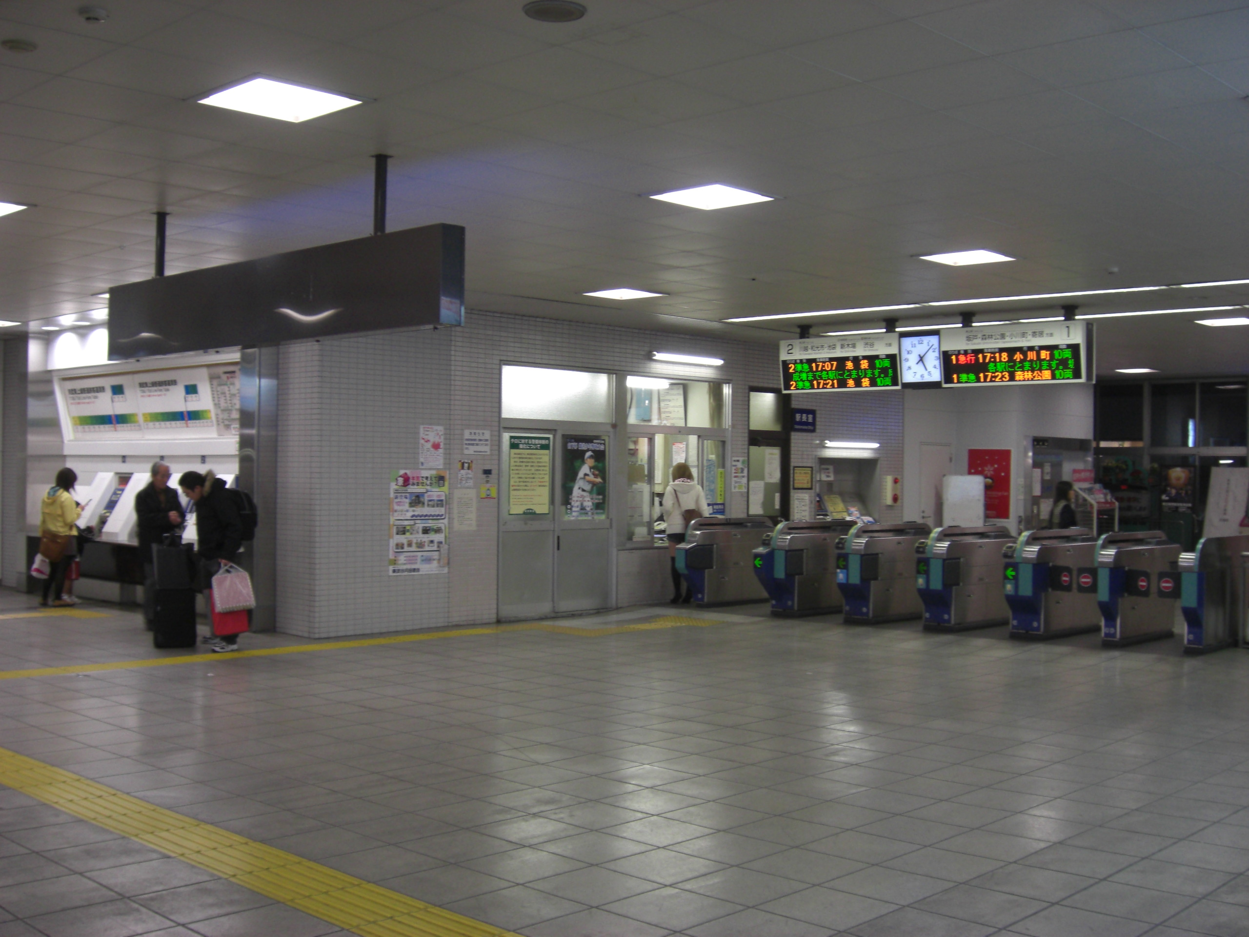 若葉駅 改札